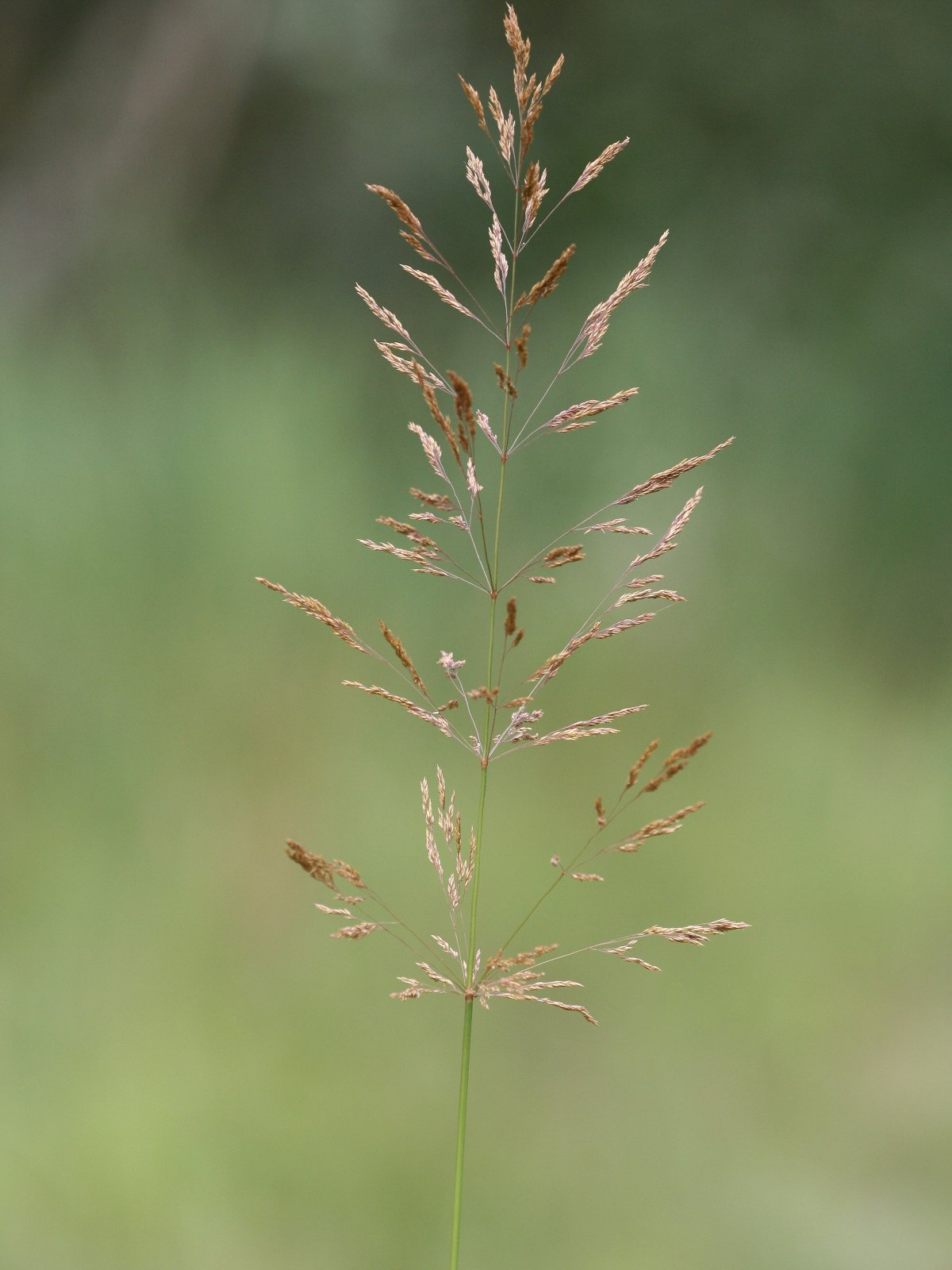 Riesen-Straußgras (Agrostis gigantea), Infloreszenz